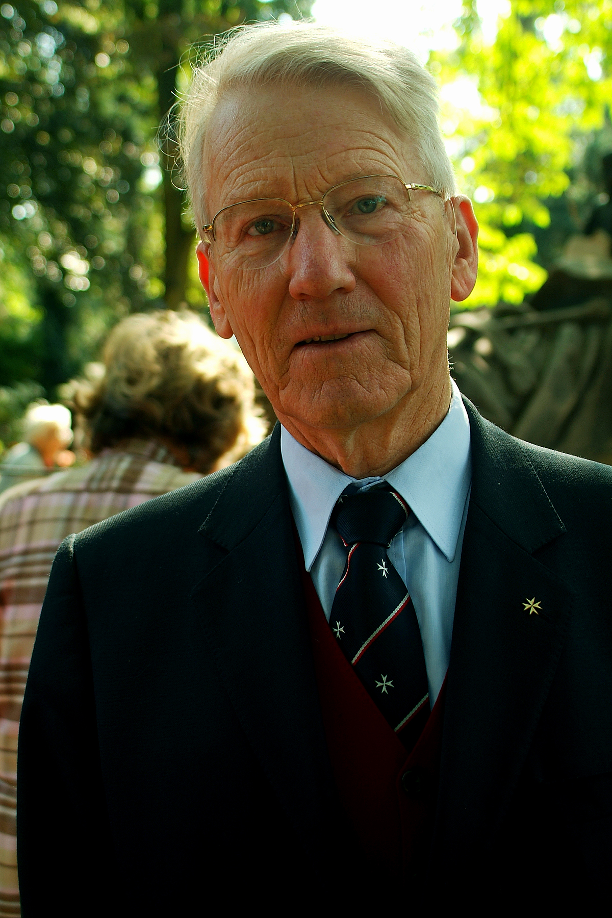 Axel Freiherr von Campenhausen, hier mit Krawatte und Anstecknadel des Johanniterordens, während der Feierlichkeiten zur Präsentation der restaurierten Grabstätte von Ernst von Malortie auf dem Herrenhäuser Friedhof ...